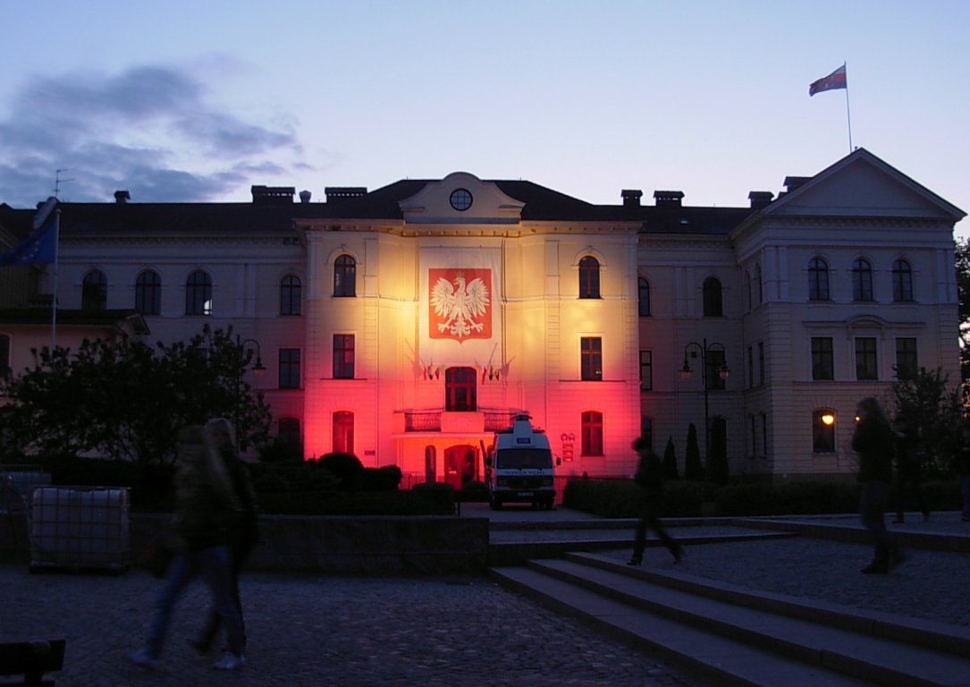 Budynek ratusza w Bydgoszczy, podświetlony w polskich barwach narodowych podczas Święta Flagi 2 maja 2011 r.